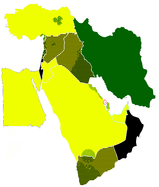 Zone Chiite Zone Sunnite Autre Rayé : Conflits entre musulmans